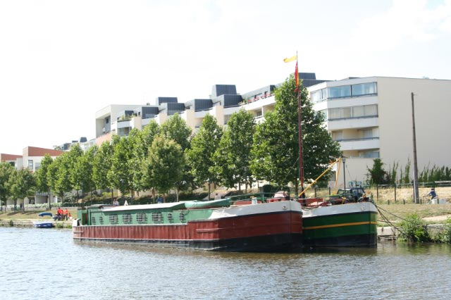 Le quai Saint-Cyr, le long de la Vilaine, à Rennes. La Péniche spectacle y est amarrée.